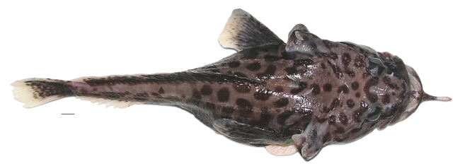 Shortbeard plunderfish Pogonophryne brevibarbata, female (dorsal view), 325 mm TL, 262 mm SL, Ross Sea, Antarctica